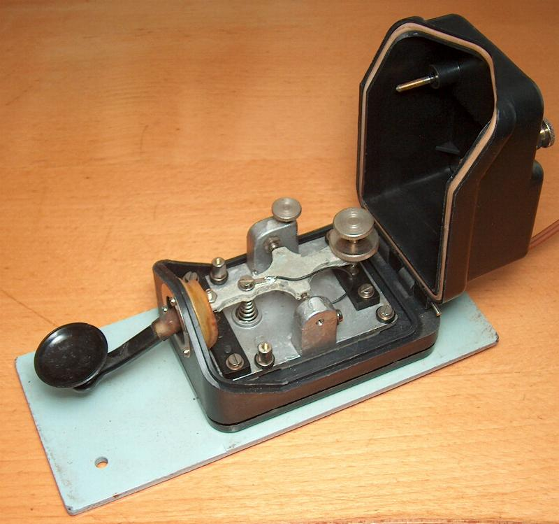 DDR Nachbau einer Junker's Morstaste, Typ MT50 Keine Herstellerangaben ersichtlich. Aufschrift am Deckel : Spannung an den Tastkontakten 200V maximal. Entstört